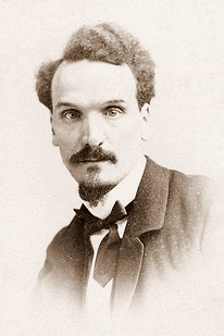 Henri Richefort